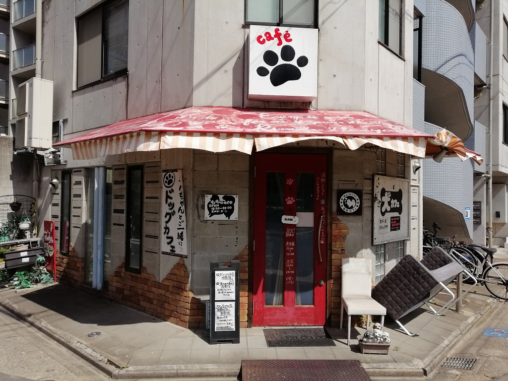 ドッグカフェ ももカフェ